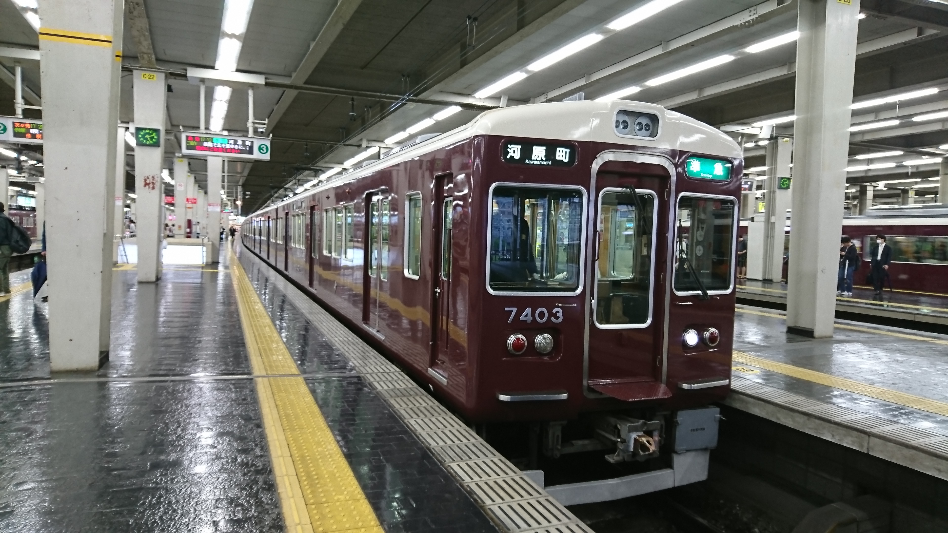 阪急7300系7303F